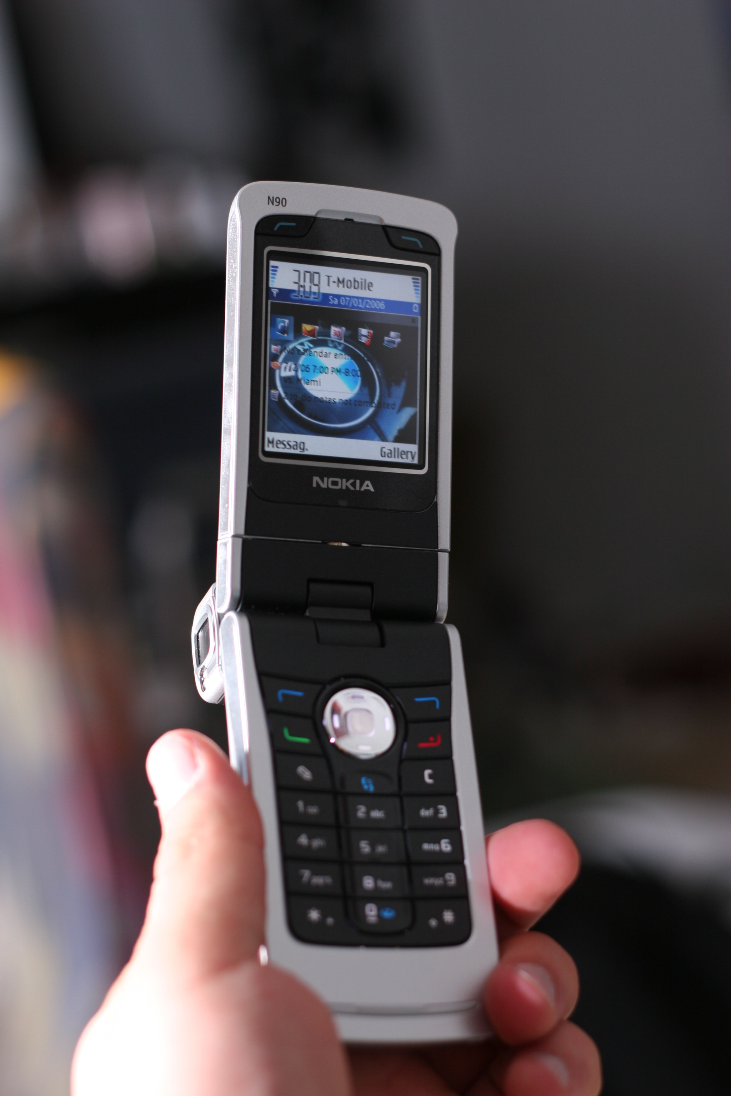 Teléfono móvil Nokia N90 abierto